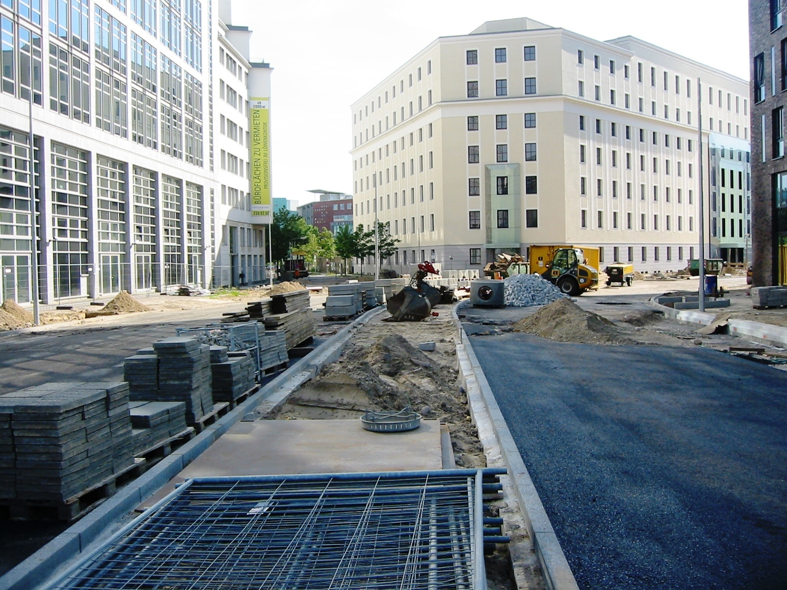 Anbindung der Axel-Springer-Straße an die B1